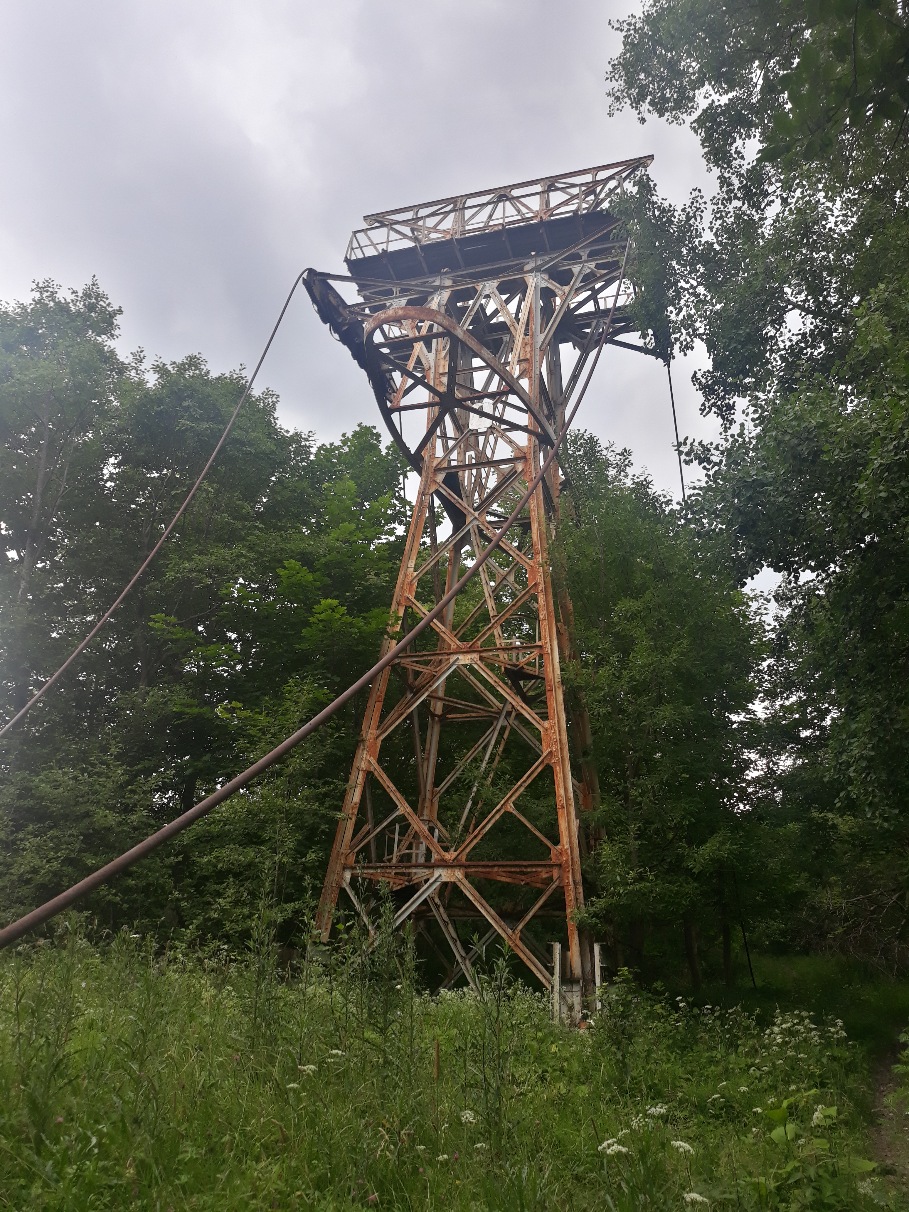 Zachovalá podpěra č. 1 (1. úsek lanovky) Visutá lanovka Tatranská Lomnica - Lomnický štít